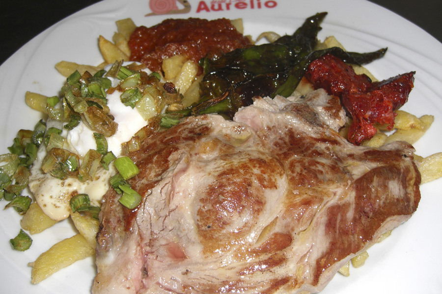 Plato combinado. Foto realizada en Venta Aurelio. Restaurante en Chipiona. Cádiz